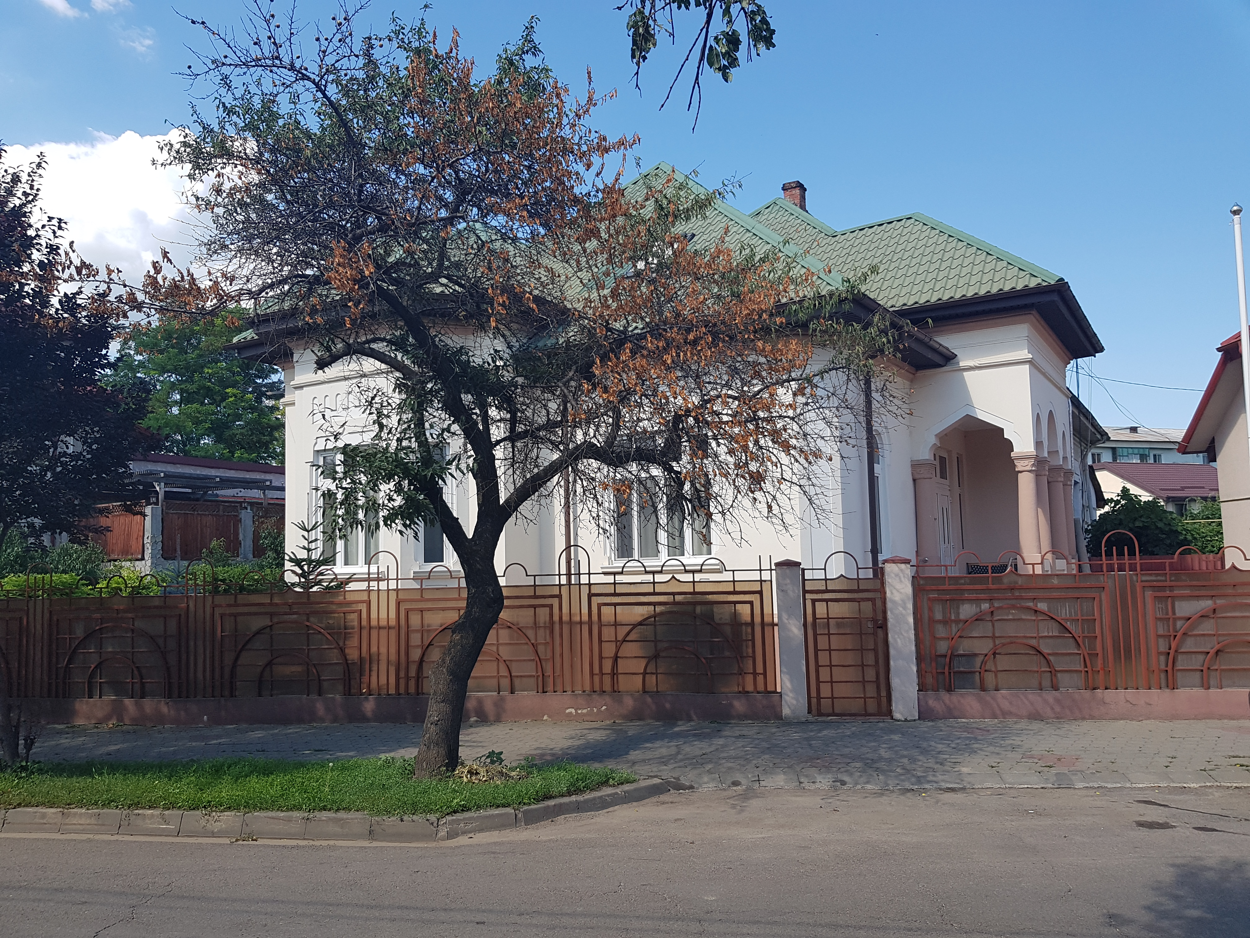 Casa Tomescu (Schmoll)